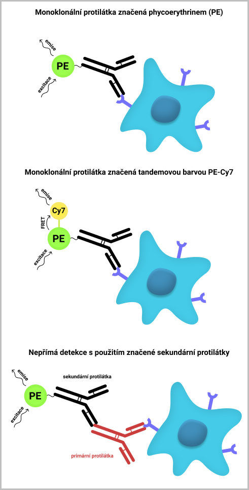 Přímá a nepřímá detekce antigenu na povrchu buňky pomocí primární nebo sekundární fluorescenčně značené protilátky. Fluorofory konjugované s protilátkou mohou být samostatné nebo vázané s menším molekulou (tandemové barvy).